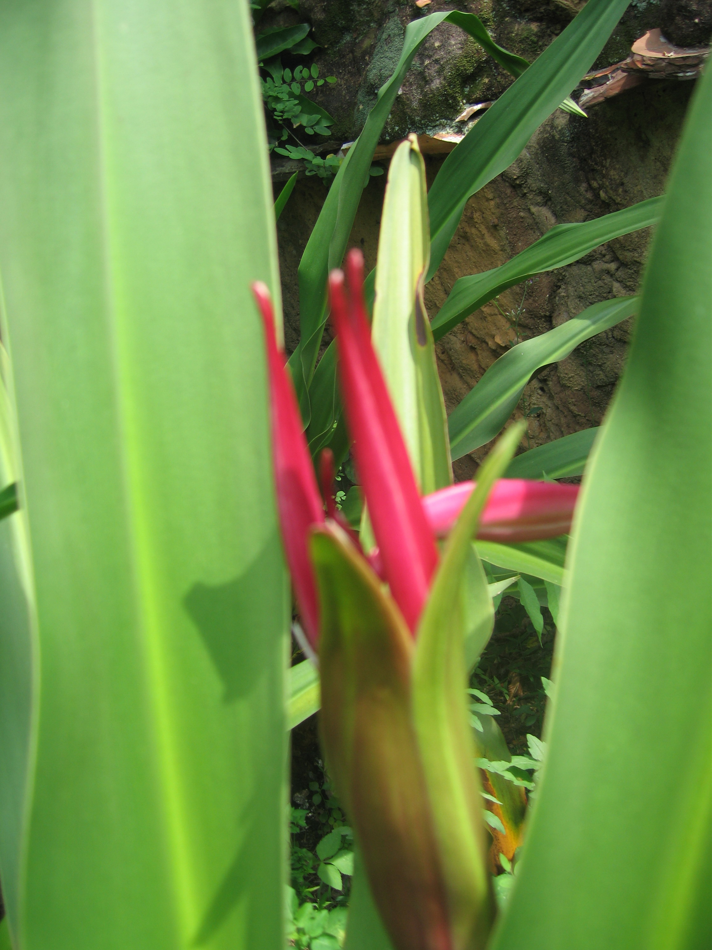 Picture of NNU